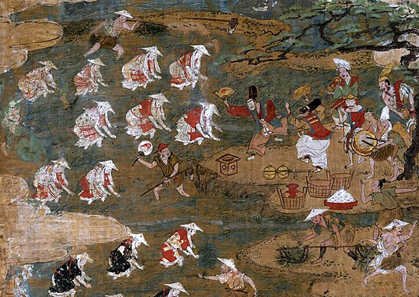 Японское село в 16 веке